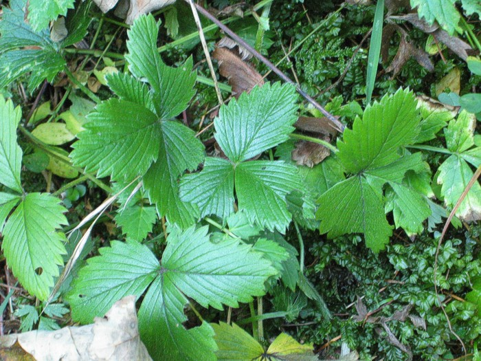 Incurvaria praelatella, Fraßspuren der Raupen